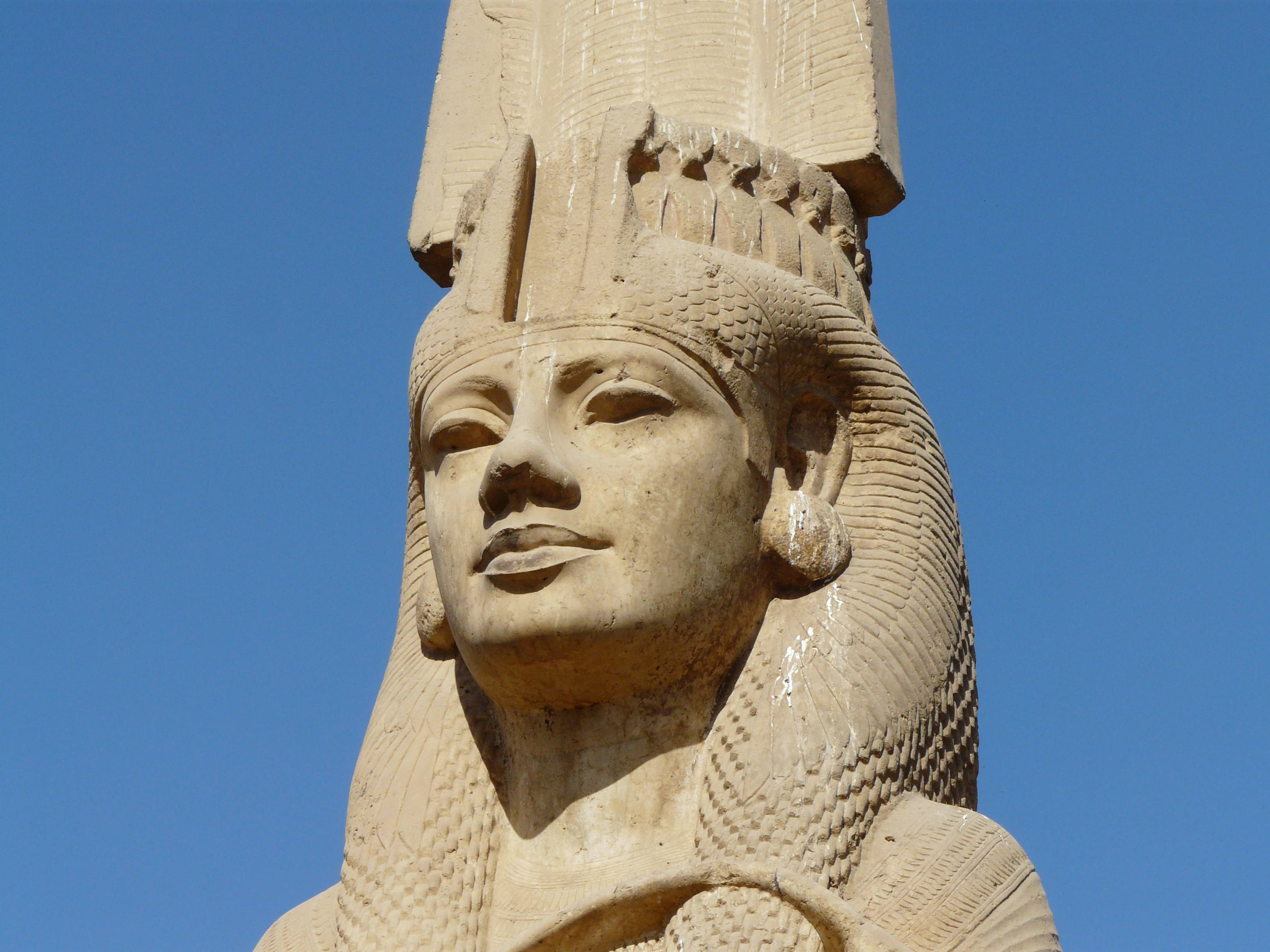 Akhmim - Statue colossale de Meritamon, fille de Ramsès II, détail du visage